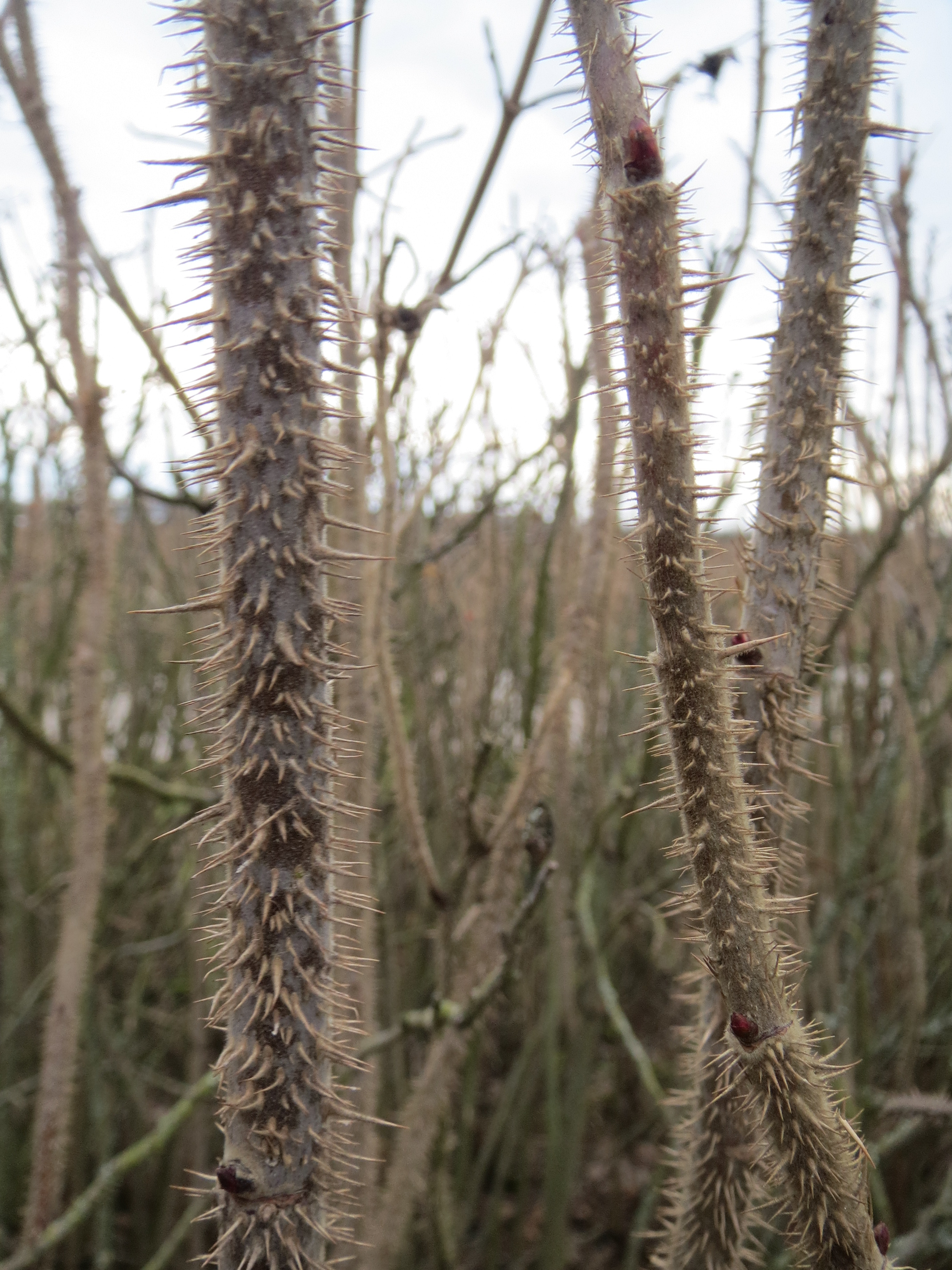 Kartoffel-Rose (Rosa rugosa) bei Reilingen